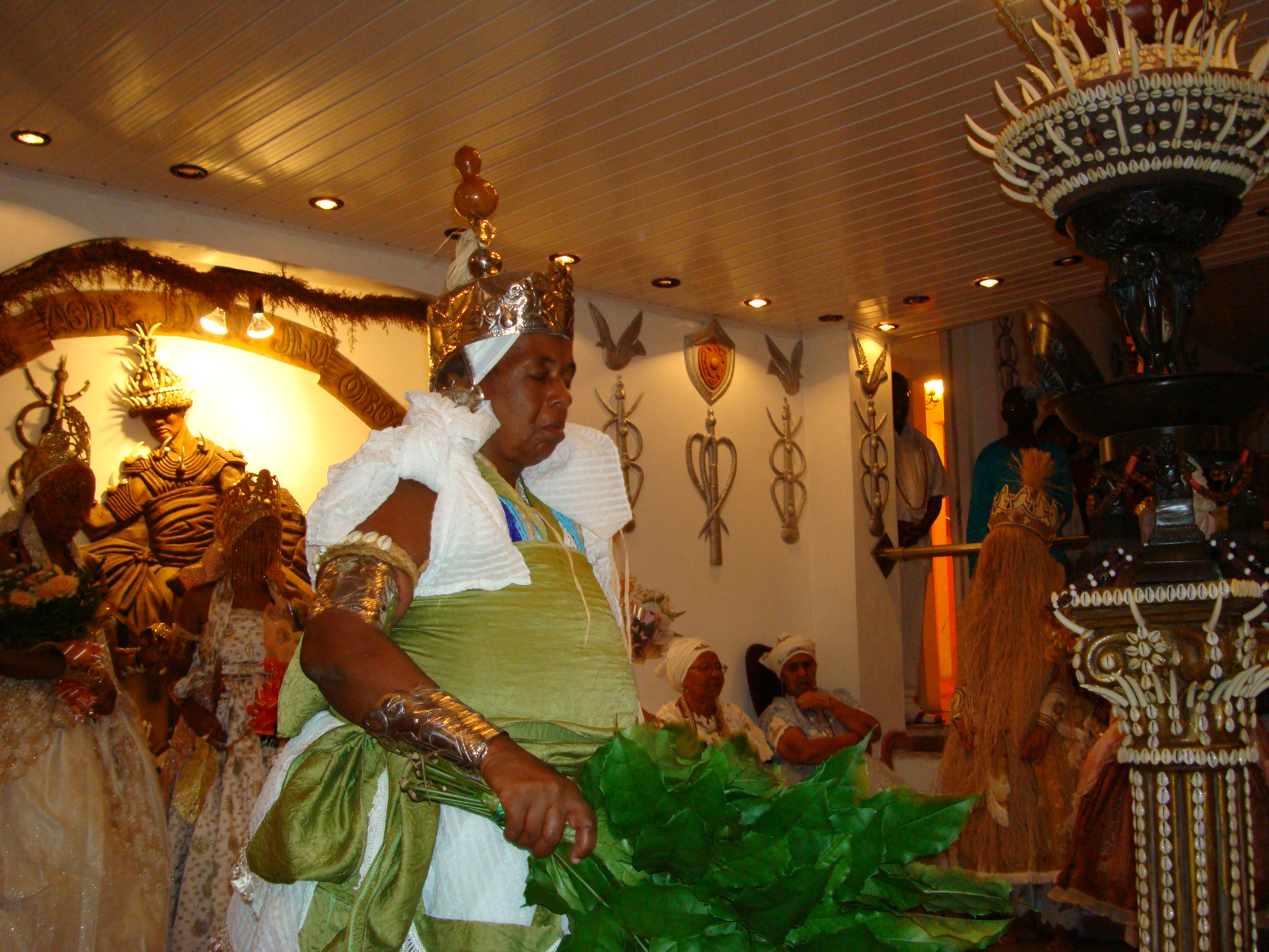 Orixa Ossain Orossi